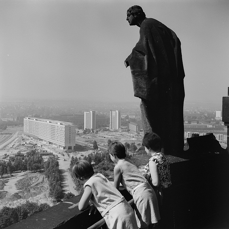 Original image description from the Deutsche FotothekDresden. Aussichtsplattform des Rathausturmes mit Besuchern, Blick nach Süden, Hotels und Rundkino gibt es noch nicht